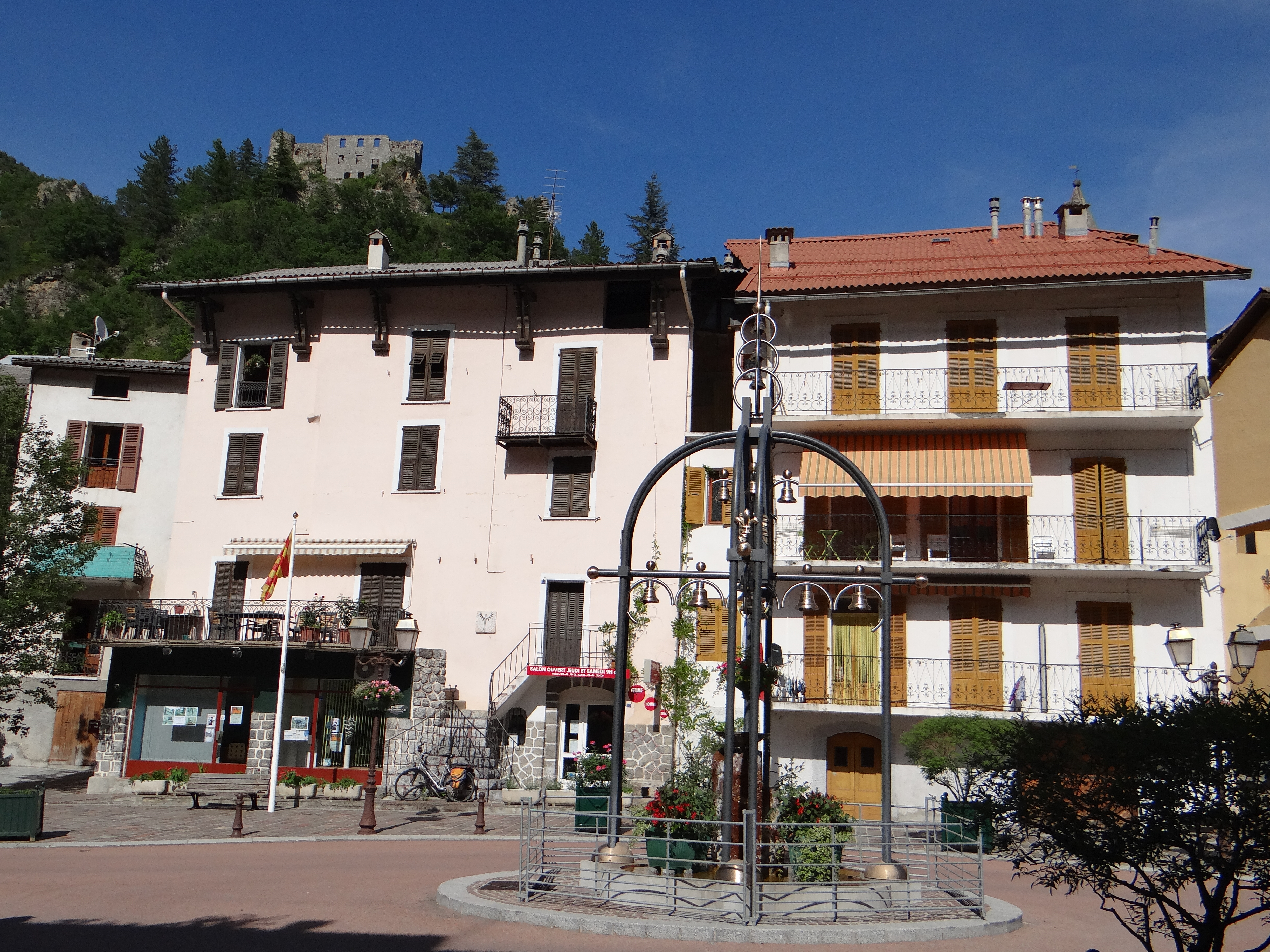 Guillaumes